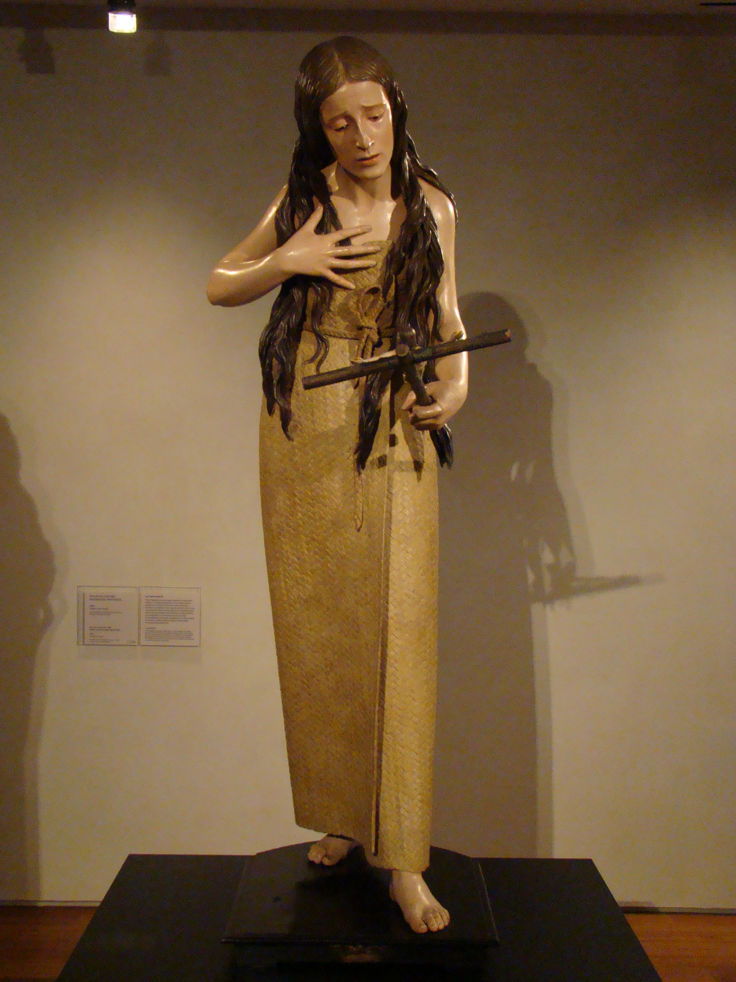 Magdalena penitente. Escultura de Pedro de Mena. Se conserva en el Museo de Escultura de Valladolid, en depósito del Museo del Prado de Madrid.